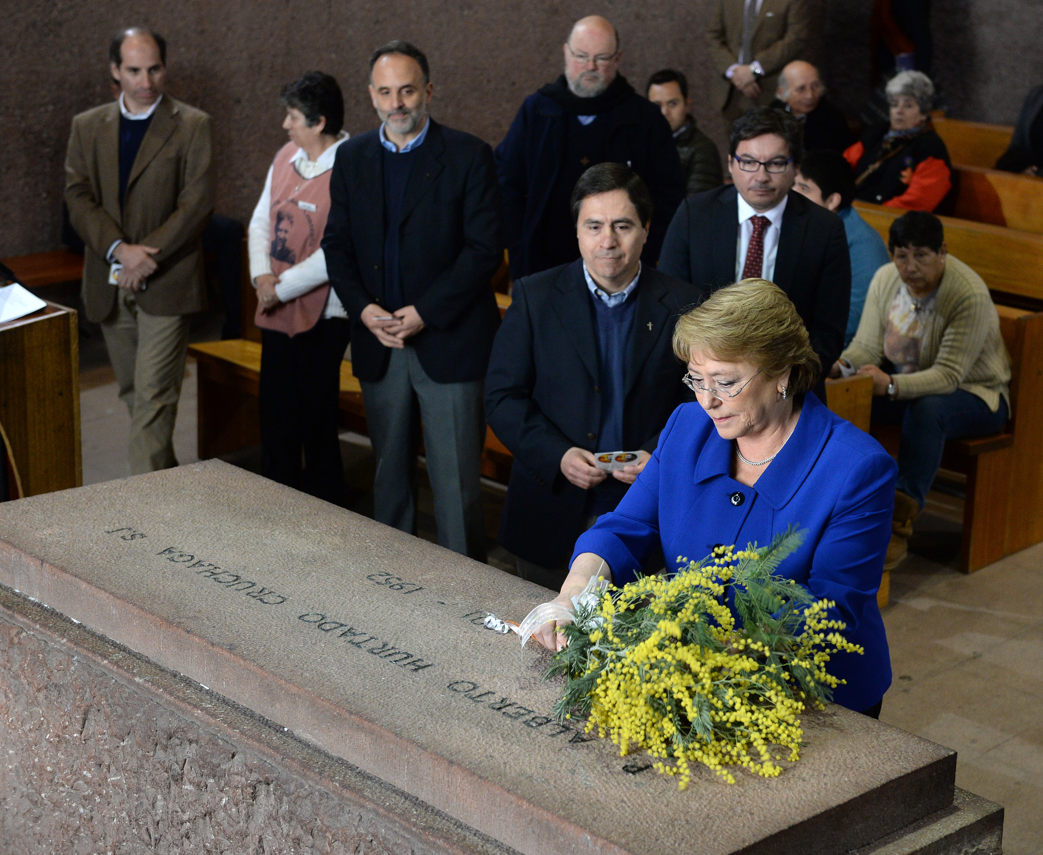 Gobierno de Chile